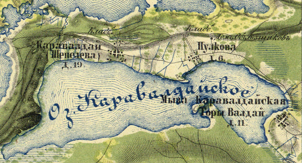 Деревни у Каравалдайского озера на карте 1860 года.